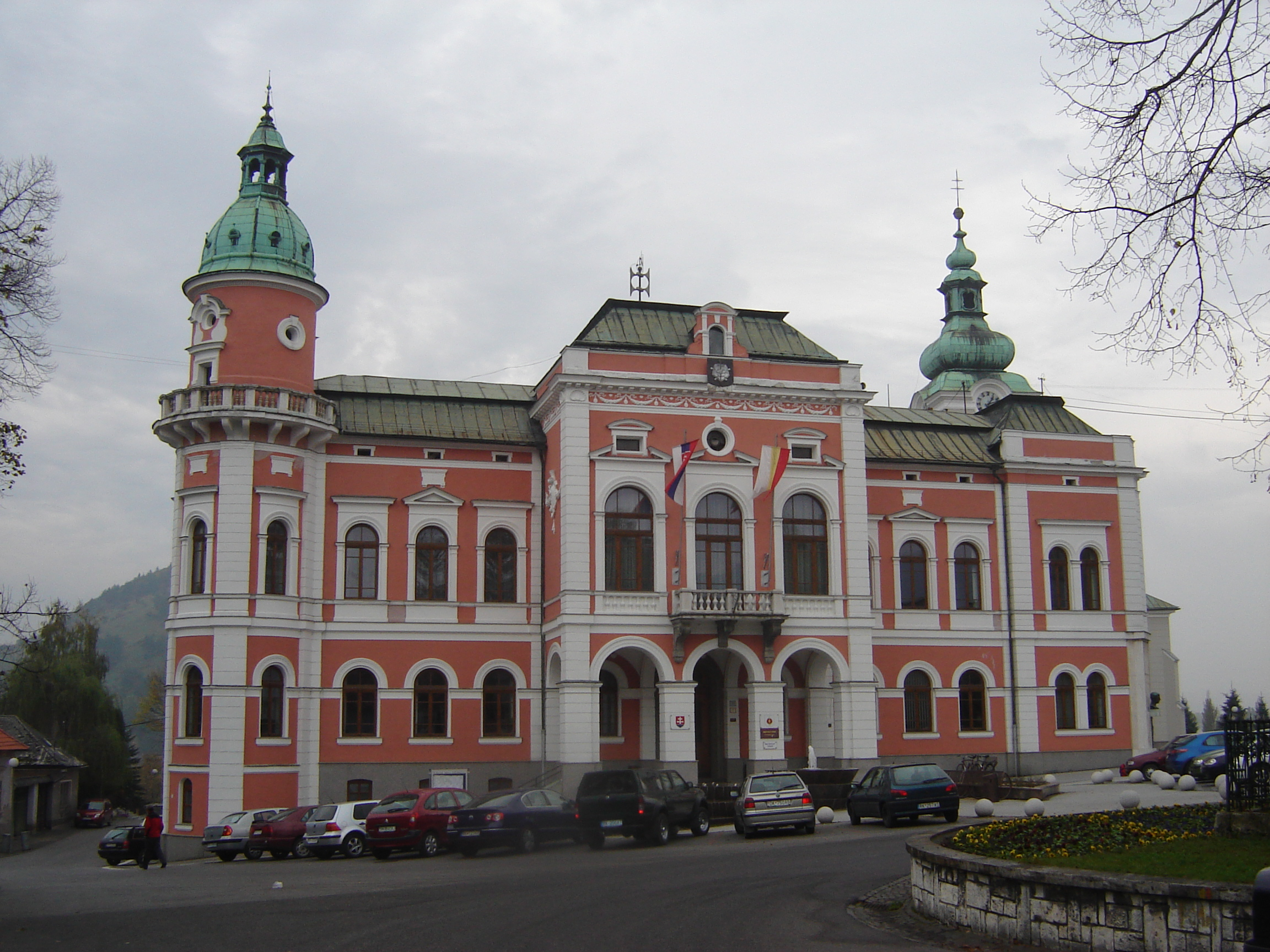 Mestský úrad Ružomberok